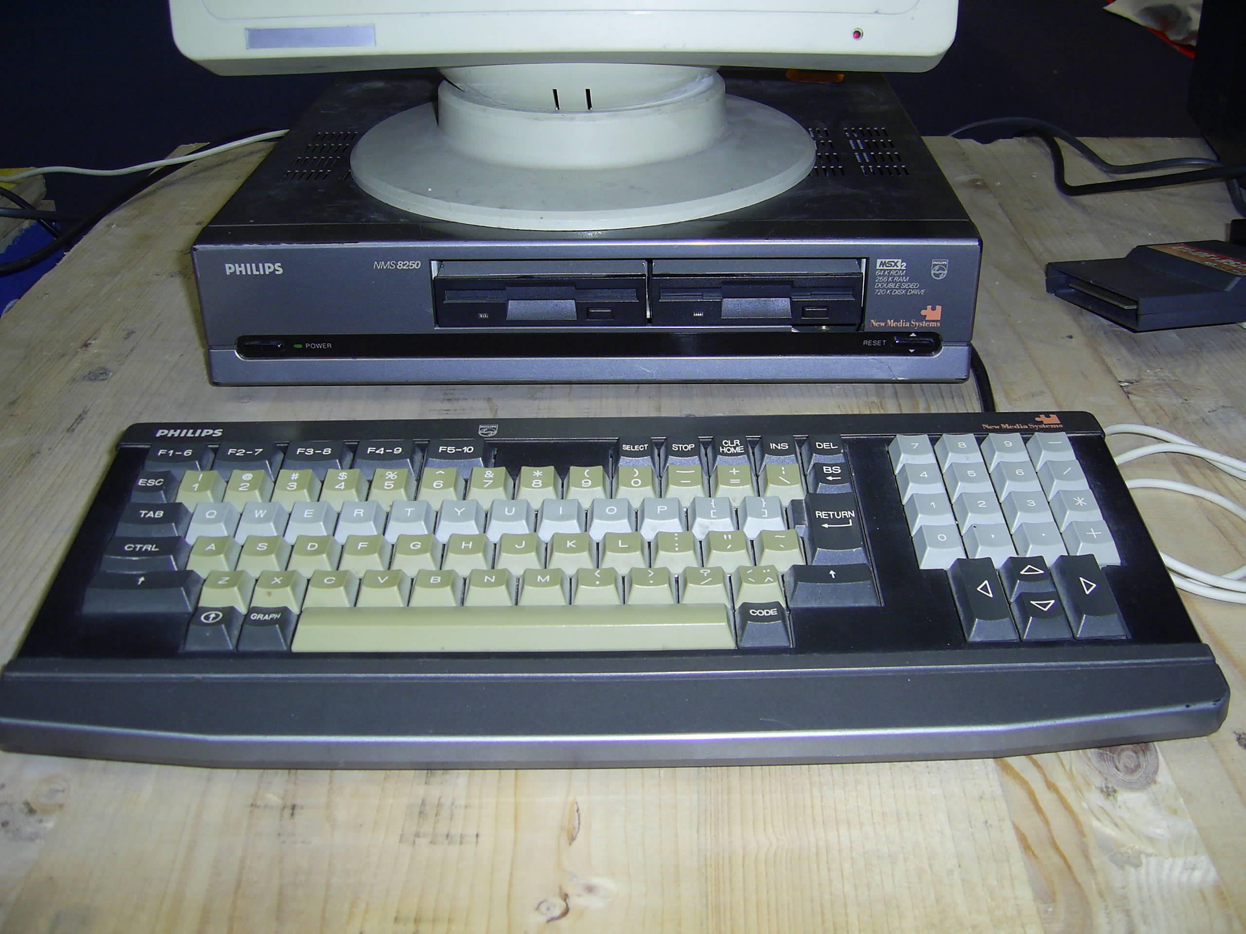 vista frontal de un ordenador doméstico Philips NMS 8250 MSX-2 en el juegódromo de la RetroEuskal 2007